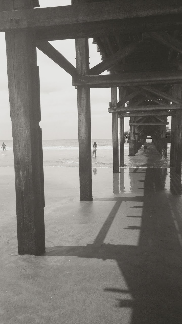 La foto fue tomada el 30 de Enero del 2019 a las 13:10 horas. Muelle de Mar del Tuyú. Ubicado en la calle 75 y Avenida Costanera de dicha localidad, perteneciente al Partido de la Costa, provincia de Buenos Aires, Argentina.